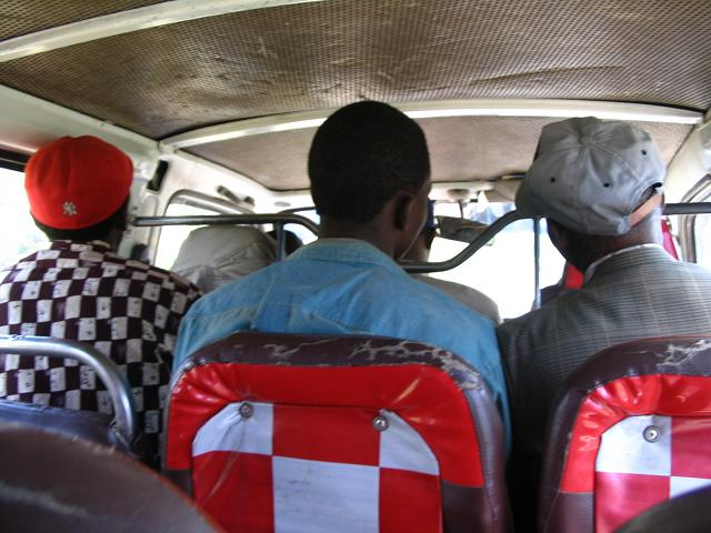 Matatu - openbaar vervoer in Kenia